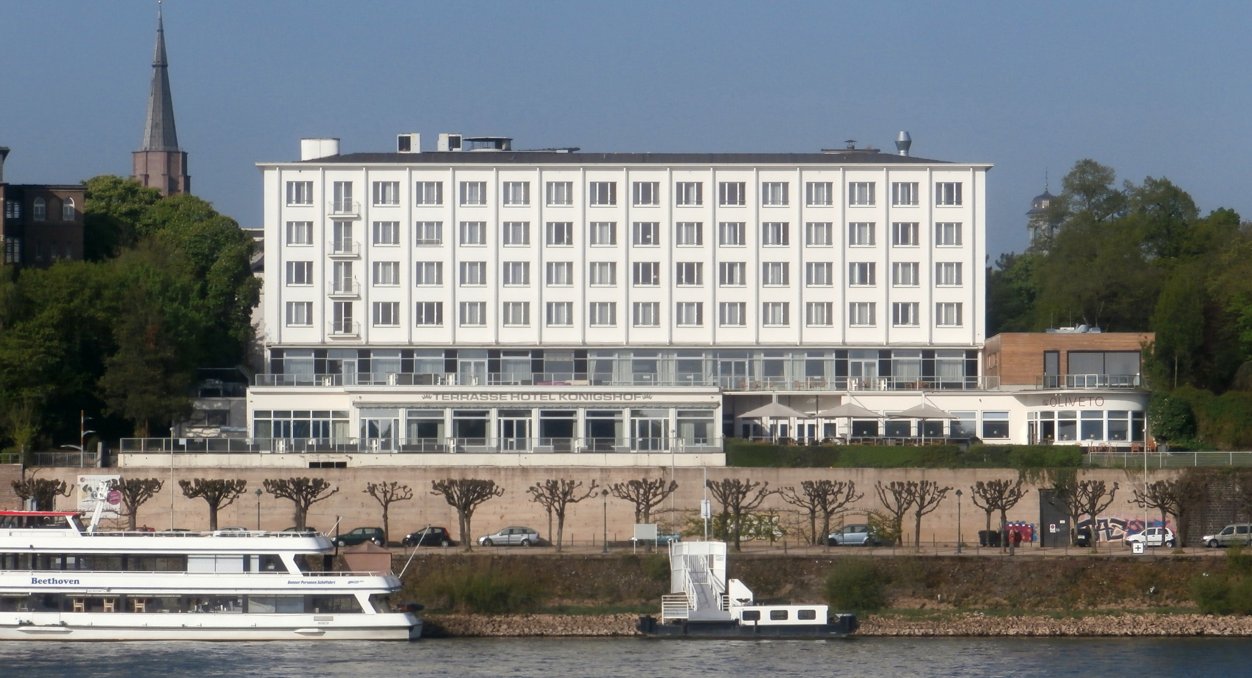 Hotel Königshof, Adenauerallee 9, Bonn: Ansicht vom gegenüberliegenden Rheinufer